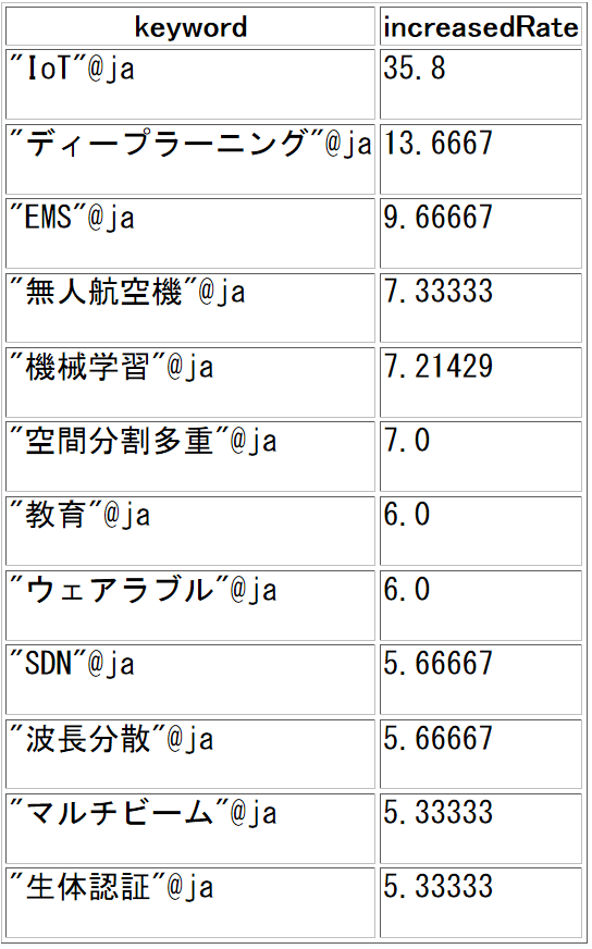 2012年から2016年において加熱した研究トピック（キーワード）を取得